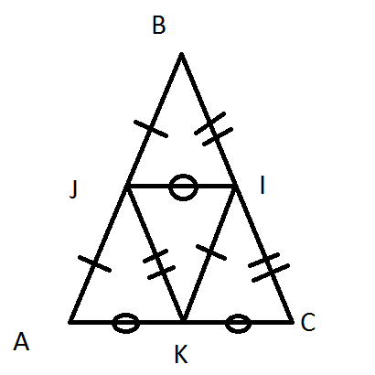 Triangle pour la démonstration du Lemme de Goursat en analyse complexe